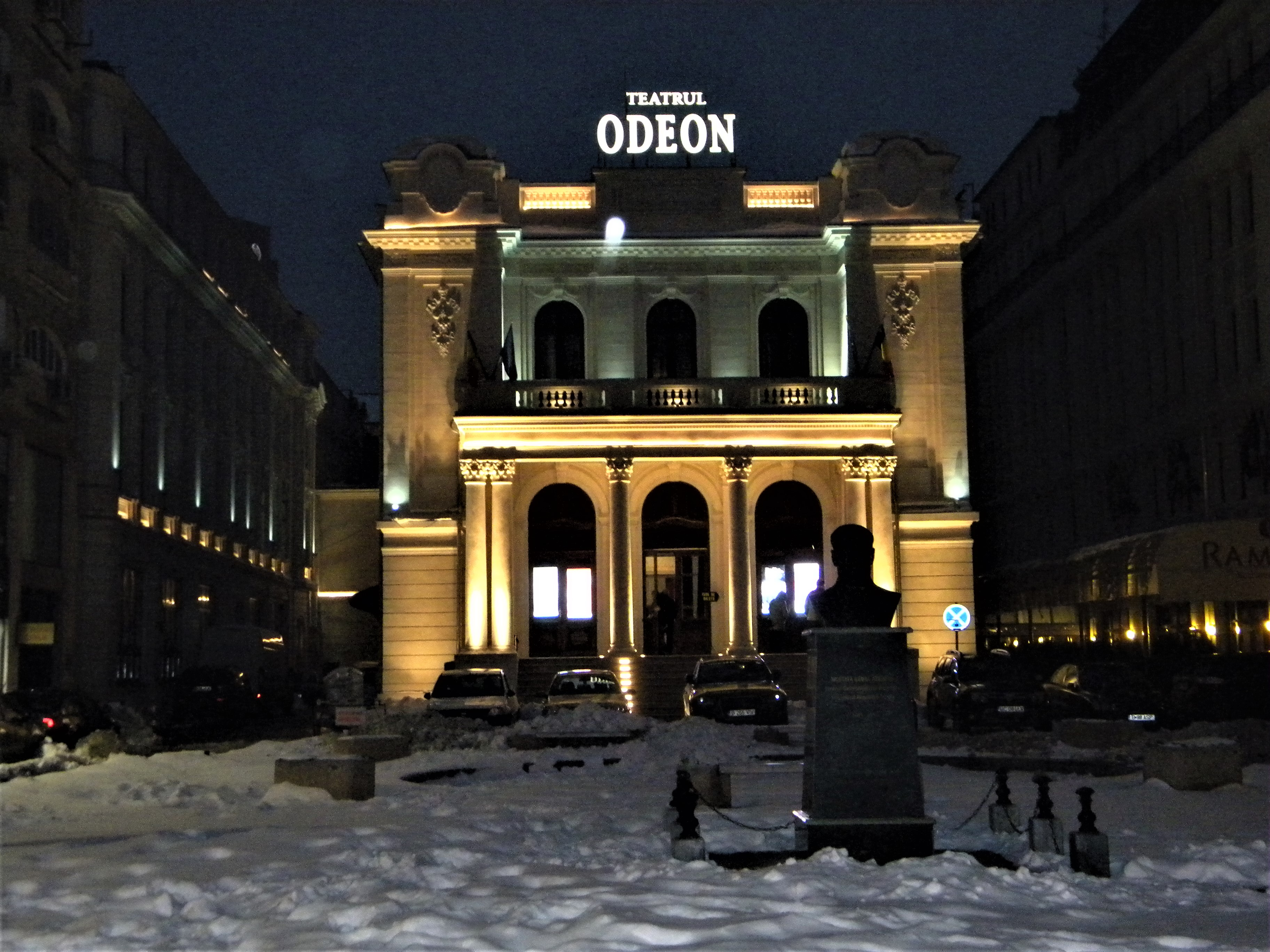 Bucuresti, Romania. Teatrul ODEON. 2 Martie 2018